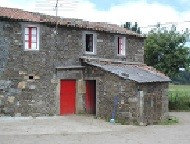 Localizada en A Igrexa